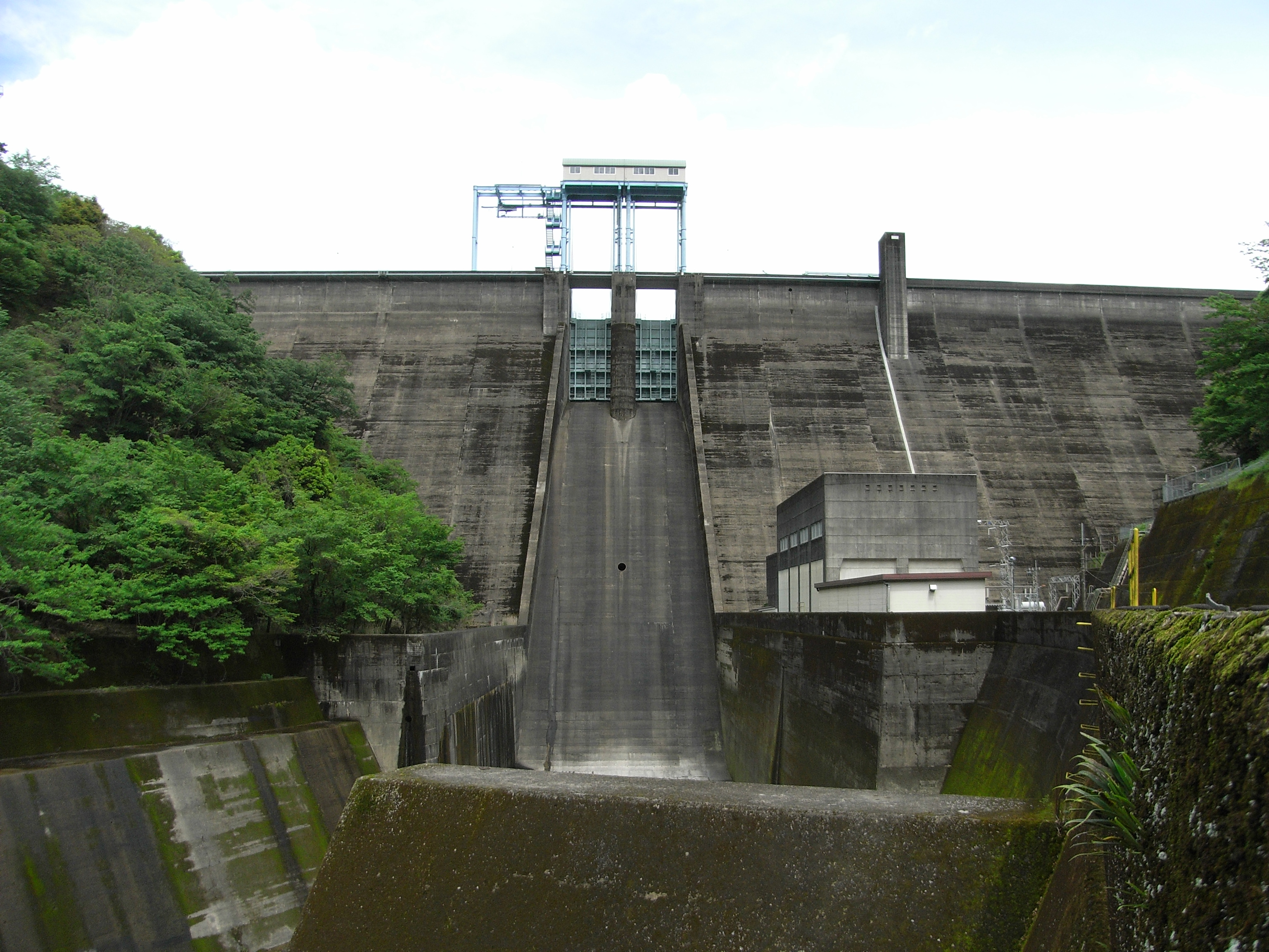 Dam